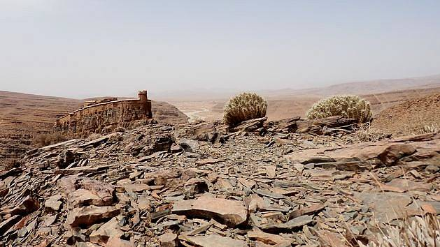 Marokko Amtoudi Agadir Id Aissa